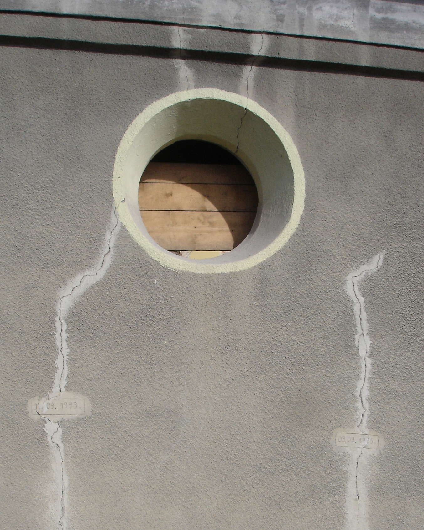 Pęknięcia na ścianie kościoła św. Józefa w Bytomiu z zaznaczonymi datami.